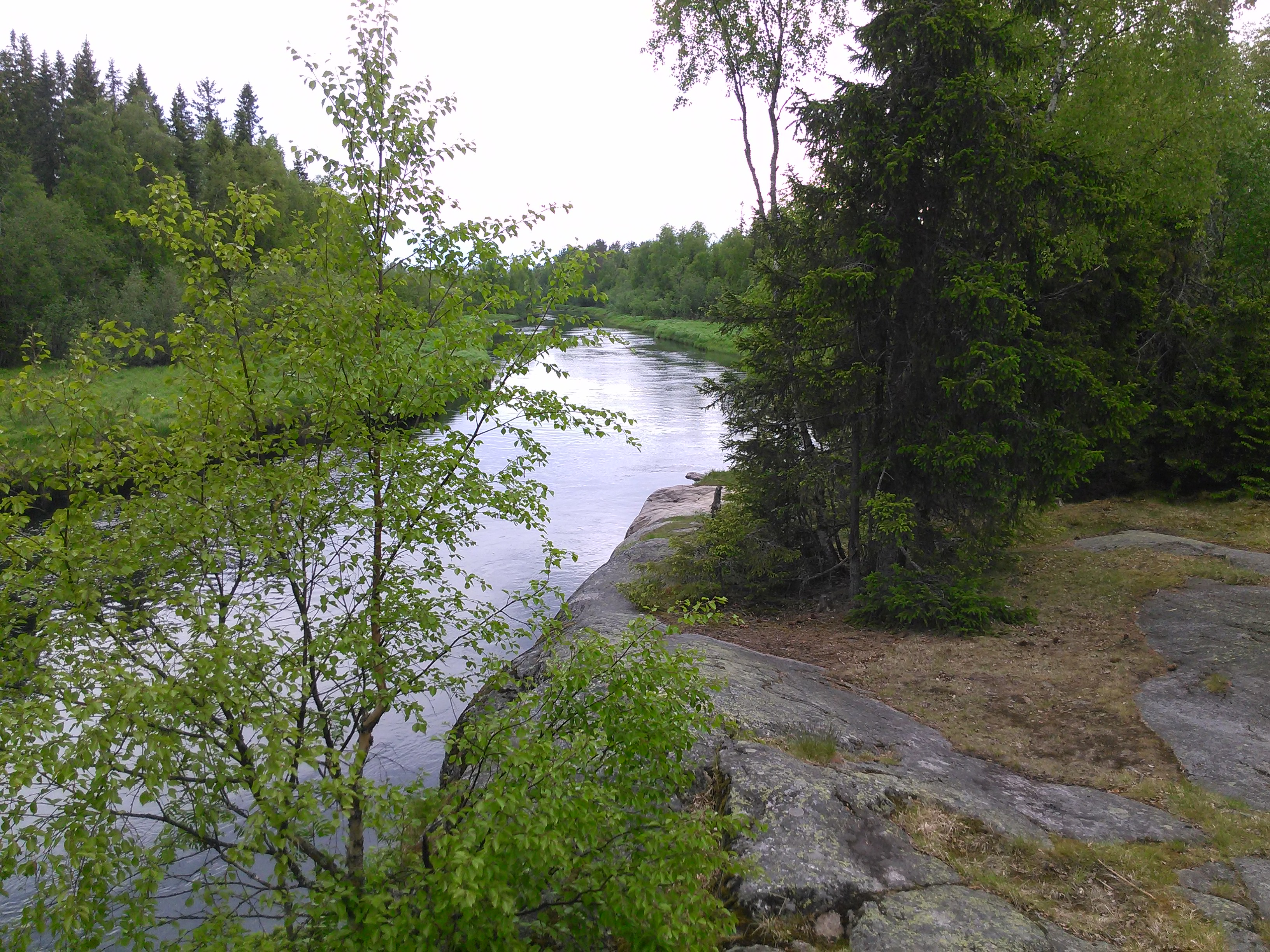 Sävarån